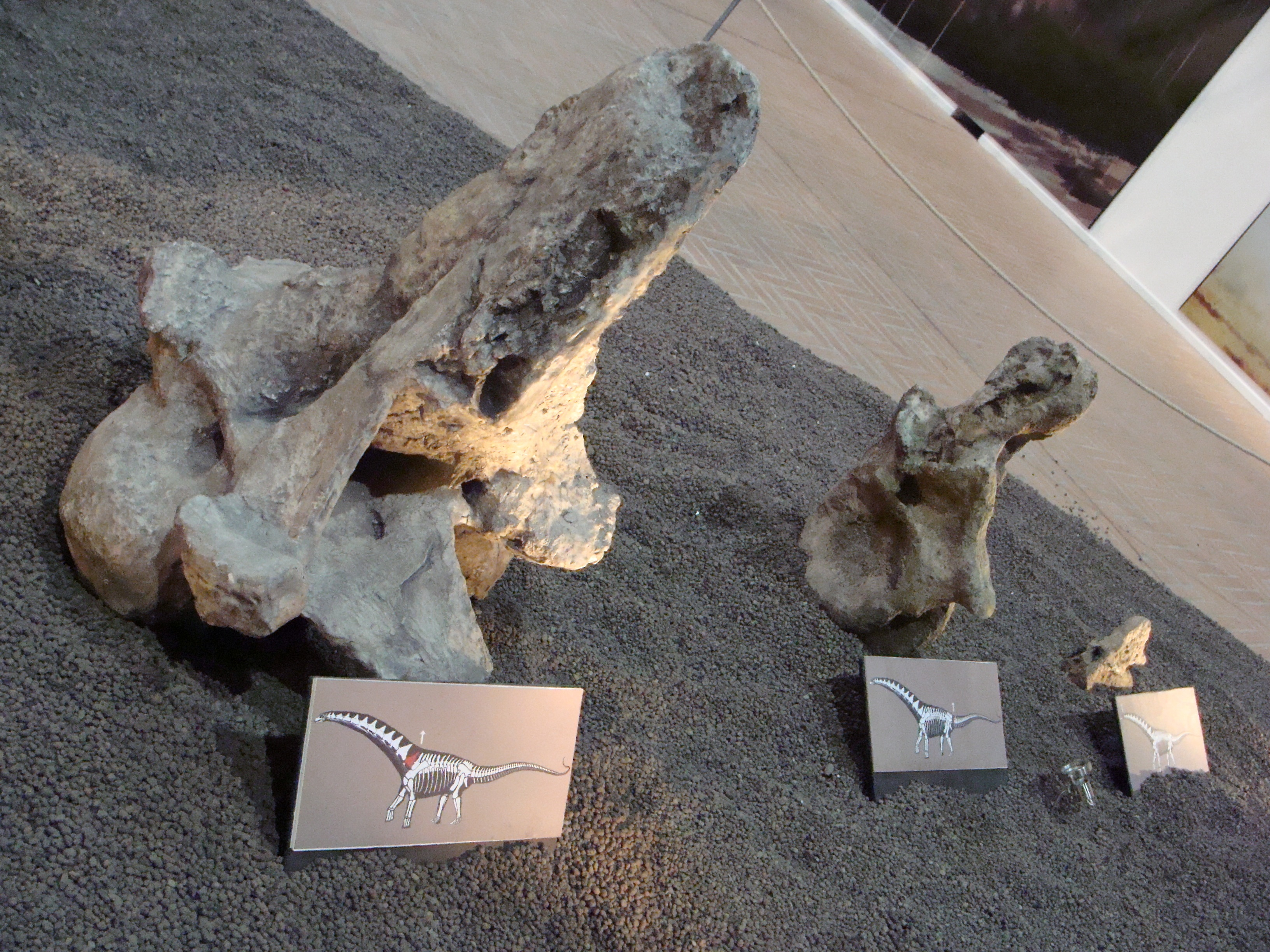 Vèrtebres de Futalognkosaurus exposades a Udine, Itàlia.